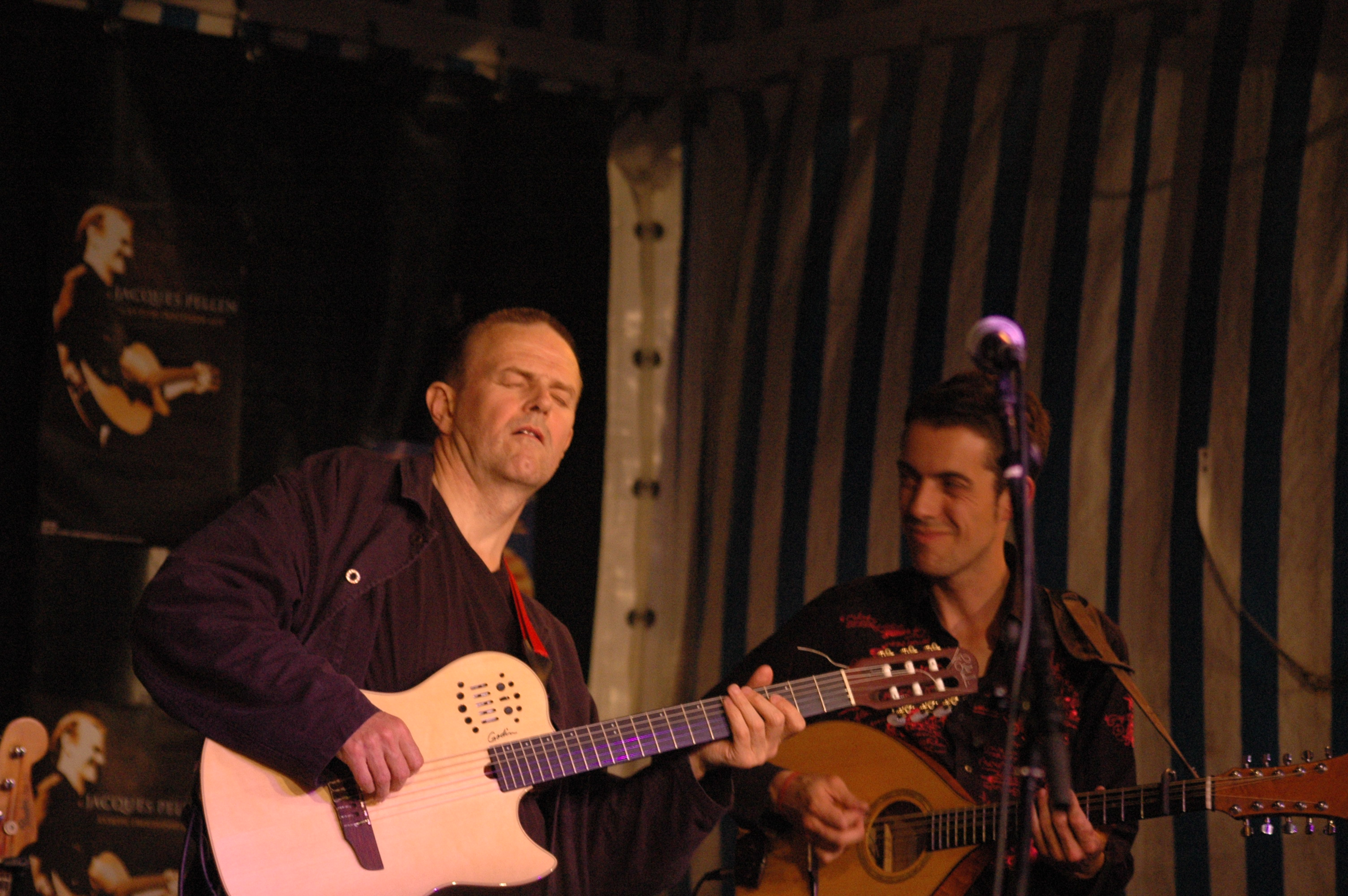 Jacques et Ronan Pellen St Quay portieux 24/08/07